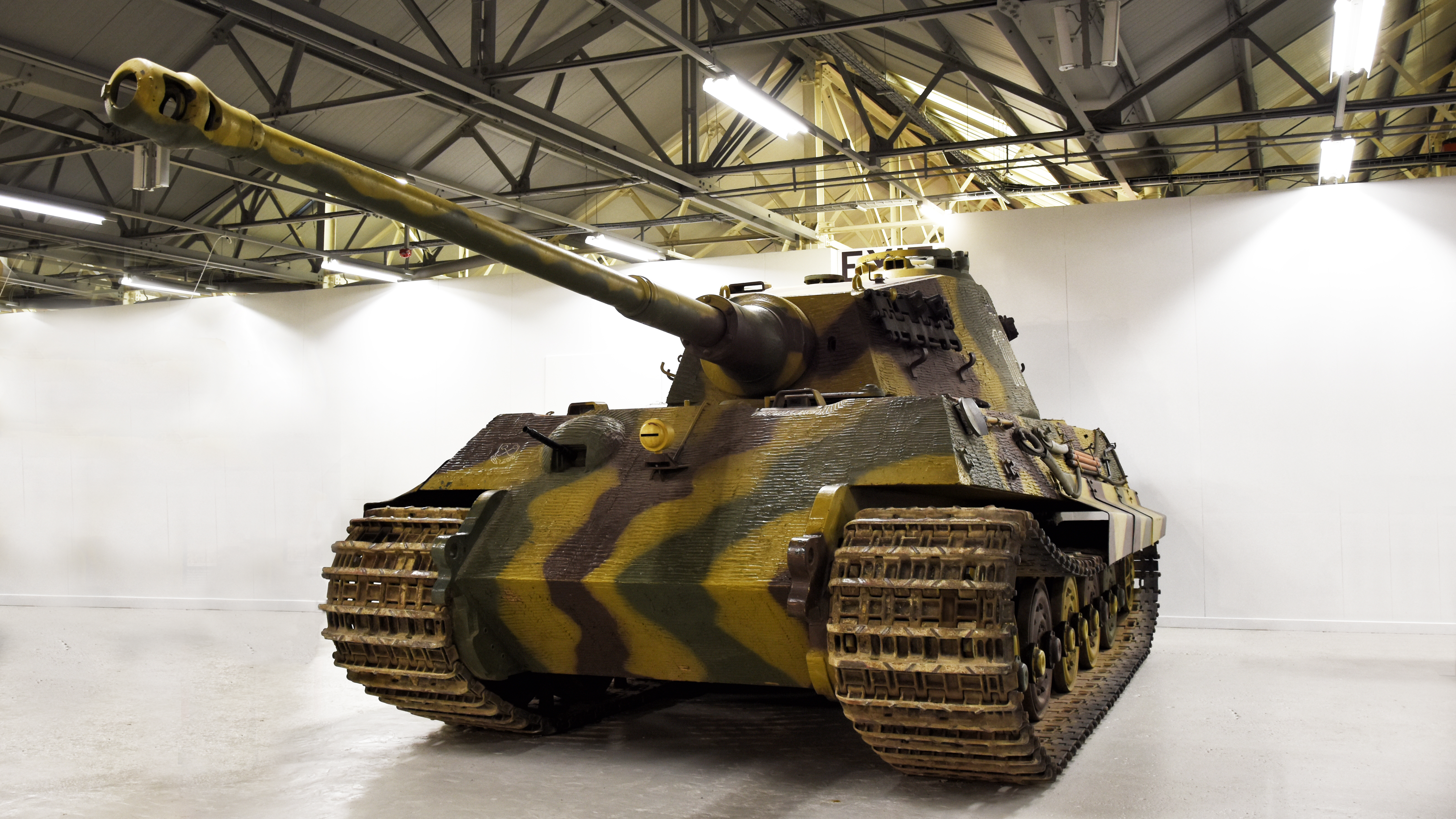 Tiger II Tank Museum Bovington 19-05-2017